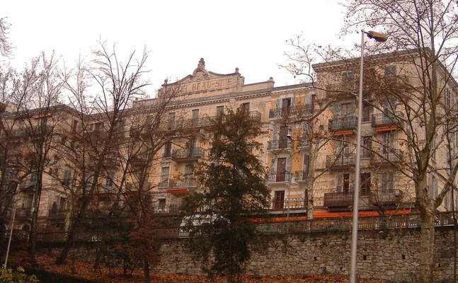 Ancien hôtel palace le Beau site présent dans le ville d'Aix-les-Bains en France dans le département de la Savoie.